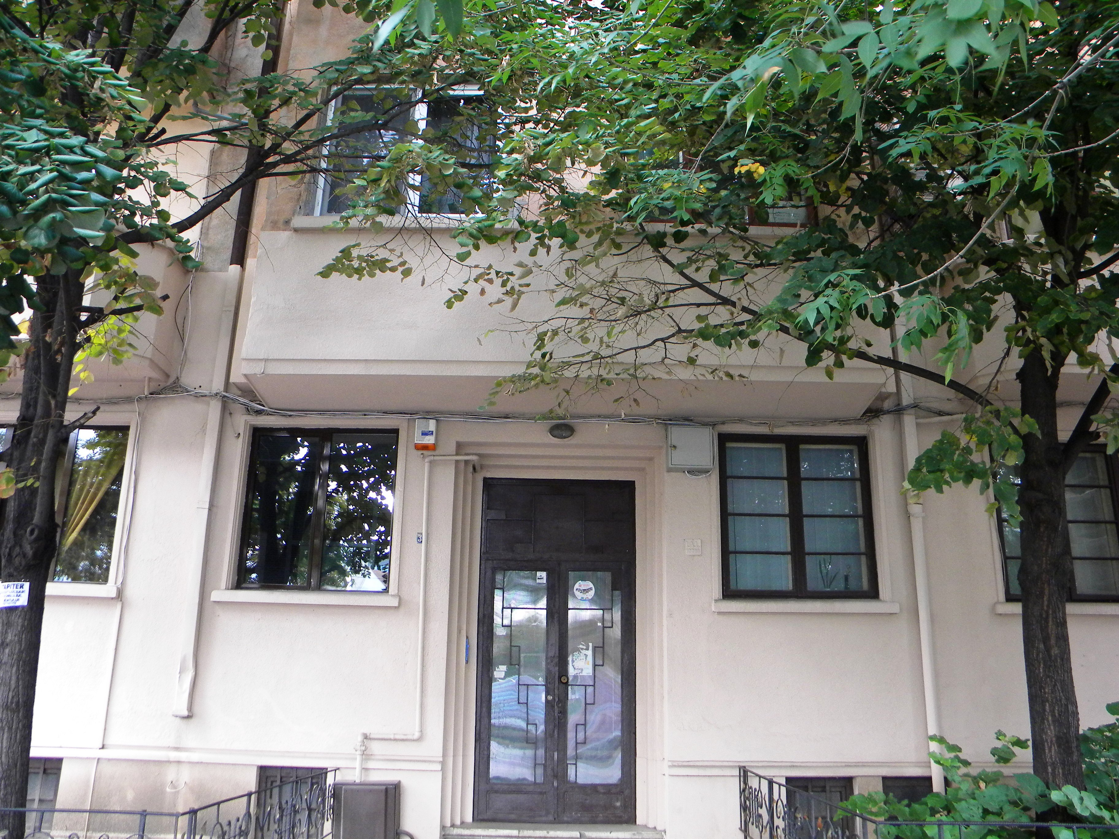 Bucuresti, Romania, Bd. Corneliu Coposu, nr. 33, sect. 3